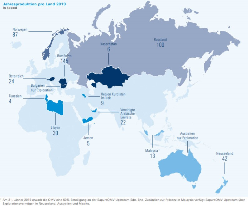 Im Geschäftsbereich Upstream konzentriert sich die OMV auf die Exploration, Entwicklung und Produktion von Öl und Gas in fünf Kernregionen: In 1) Mittel- und Osteuropa, 2) dem Mittleren Osten und Afrika, 3) Nordsee, (4) Russland und (5) Asien-Pazifik.